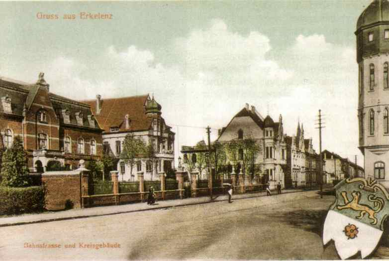 Bahnstrasse und Kreisgebäude von 1893, Erkelenz